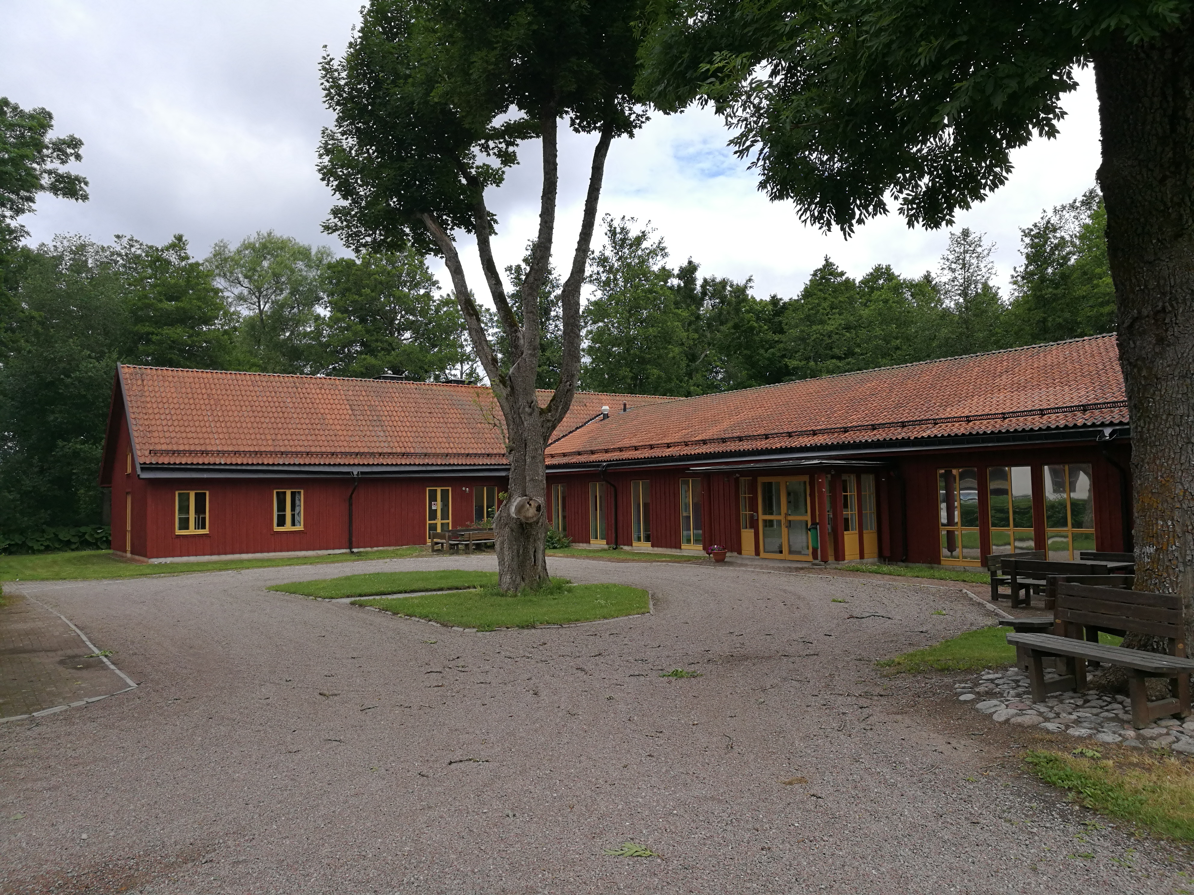 Bild över Vattenfallgymnasiet en molnig sommardag.